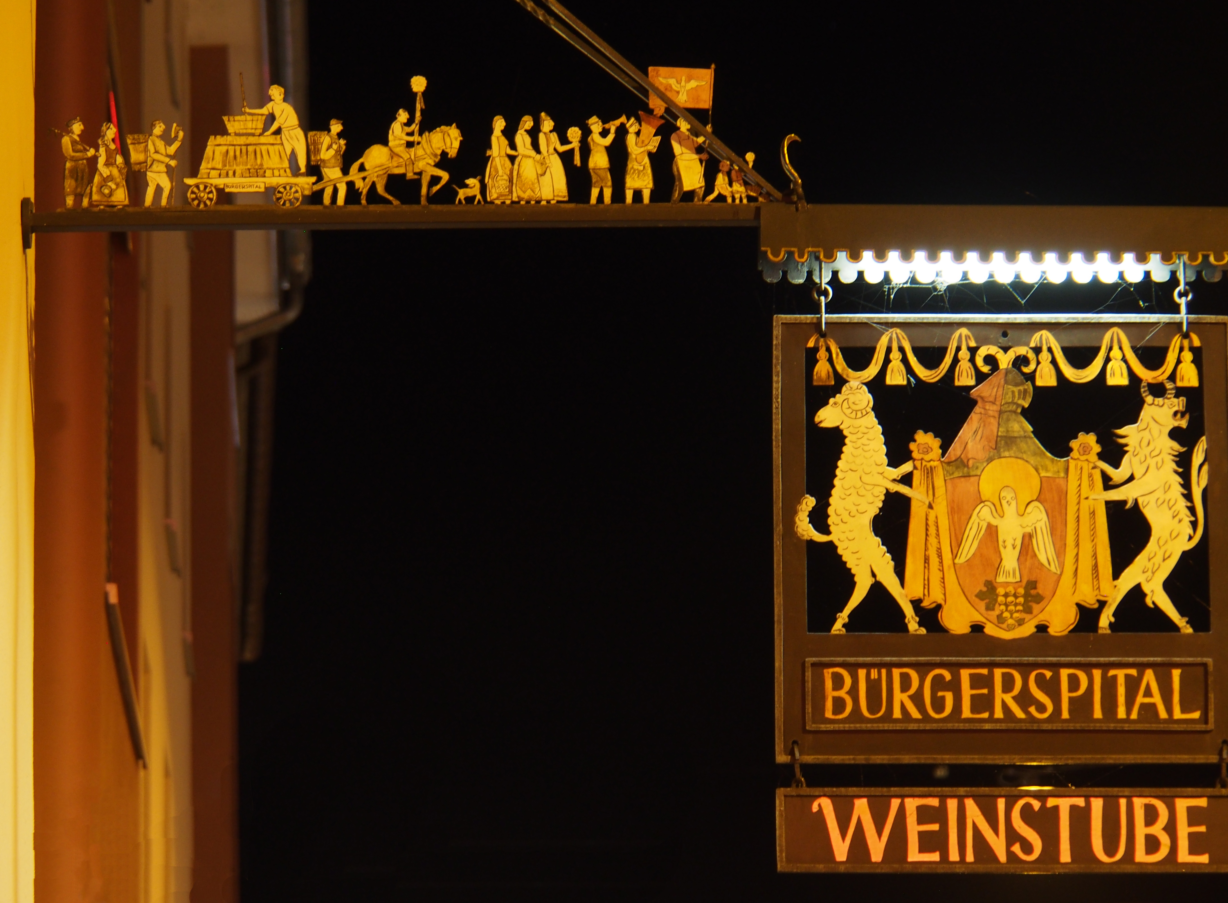 Wirtshaussschild der Weinschenke des "Bürgerspitals zum Heiligen Geist" (Würzburg)